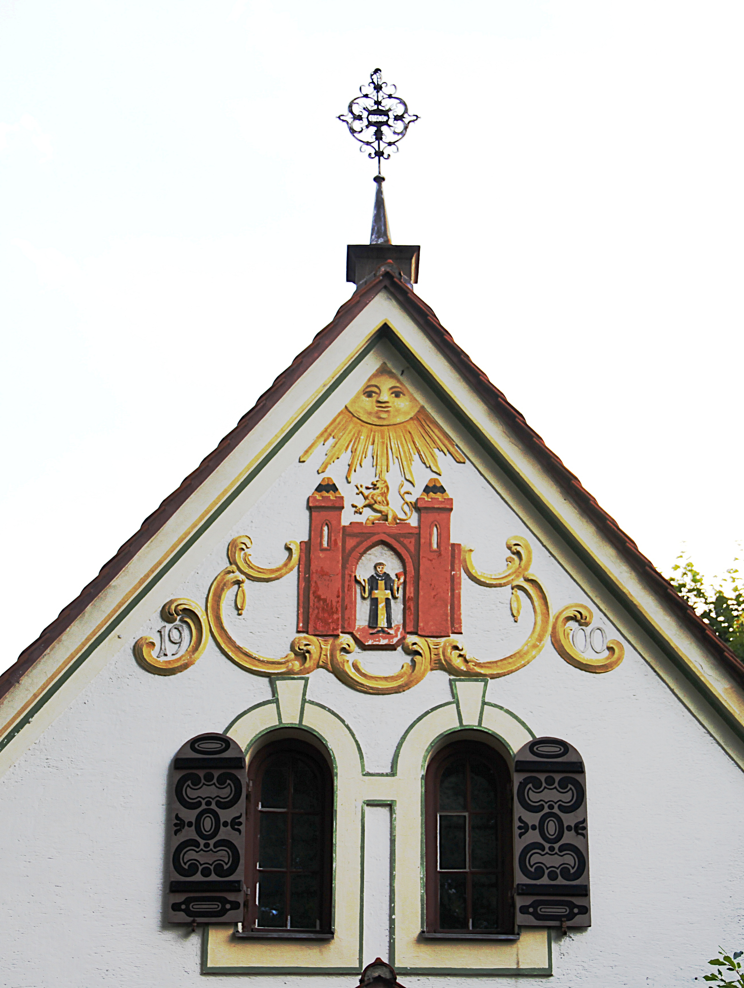 Münchner Stadtwappen am stadtseitigen Giebel des alten Zollhauses an der Wolfratshauser Straße 139